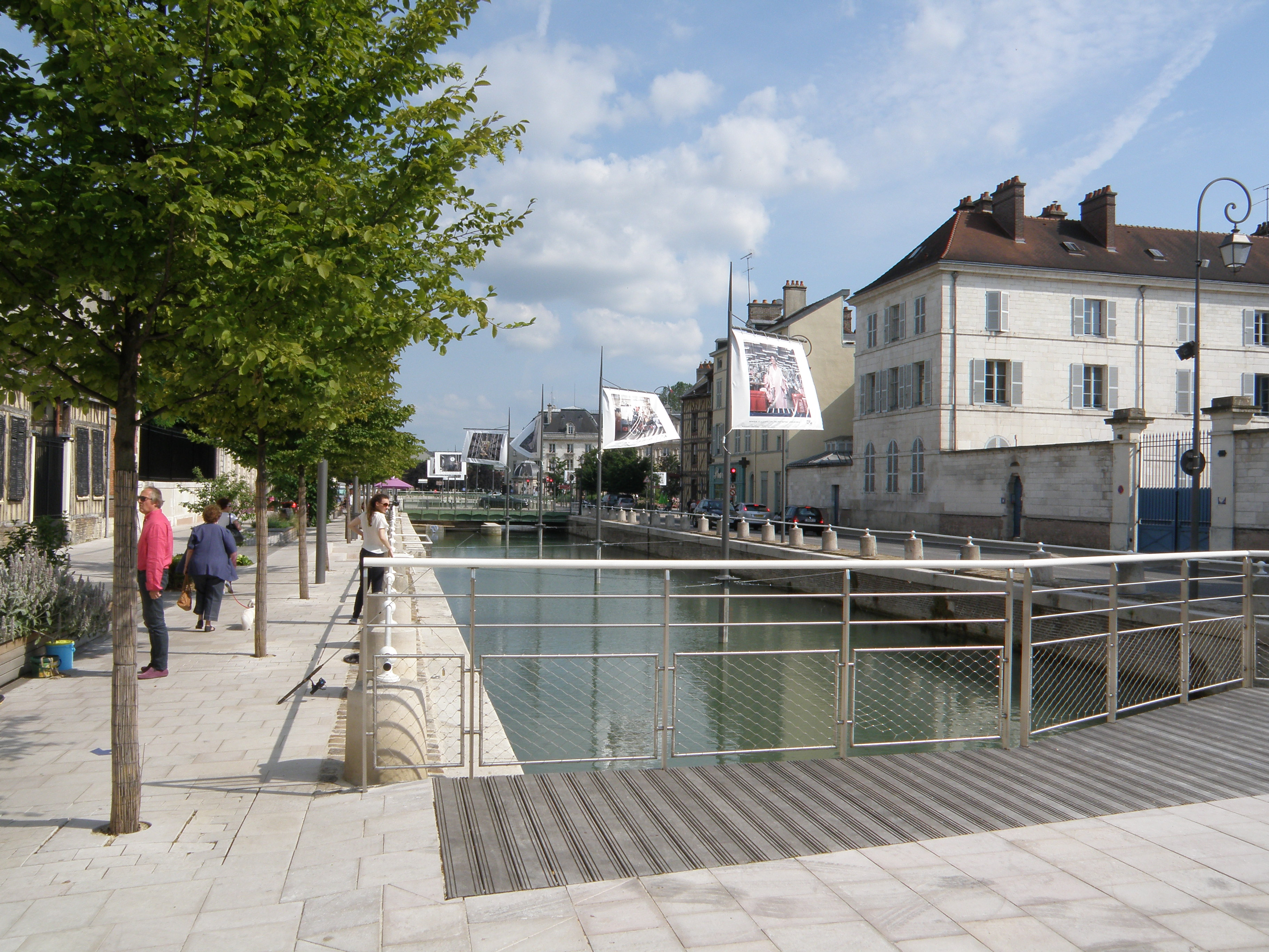 Les quais du canal de la Haute-Seine 10000 Troyes